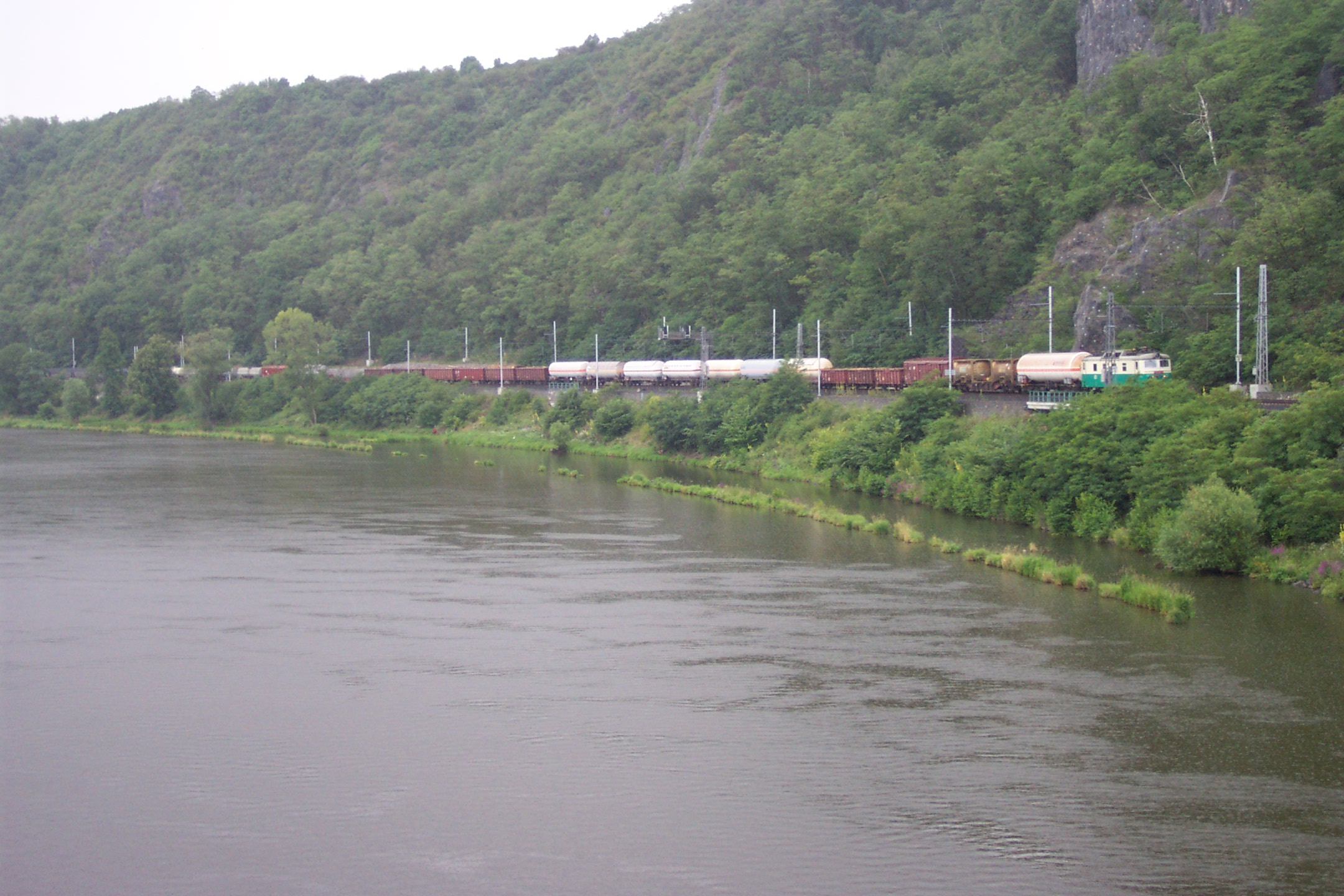 Train passing by Řež u Prahy rail station - Vlak projíždějící železniční zastávkou Řež u Prahy